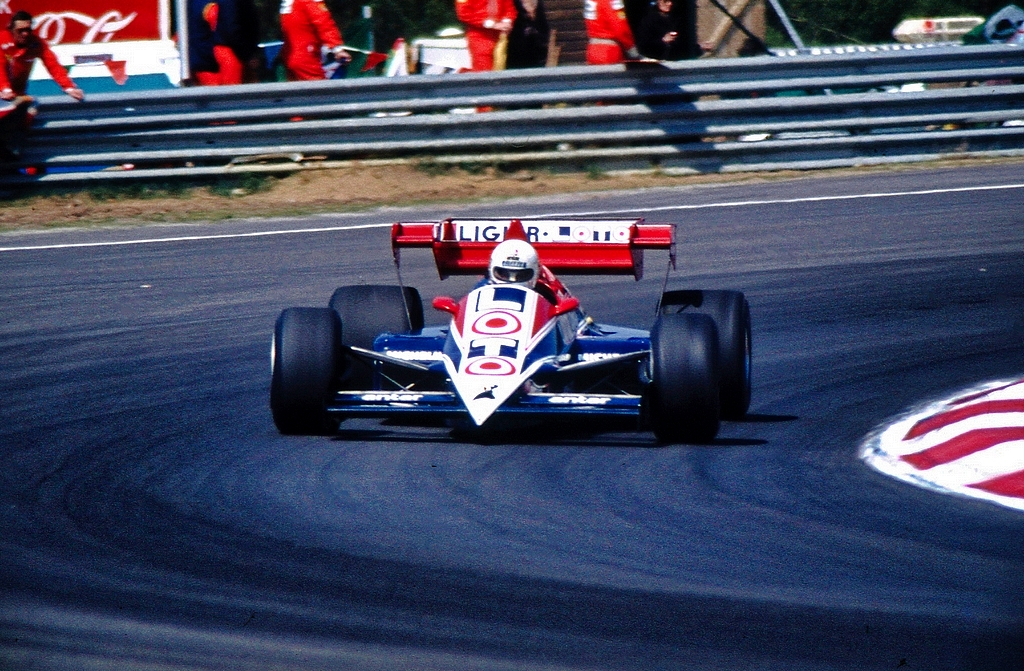 Andrea De Cesaris sur Ligier JS23 lors du GP Belgique 1984 à Zolder